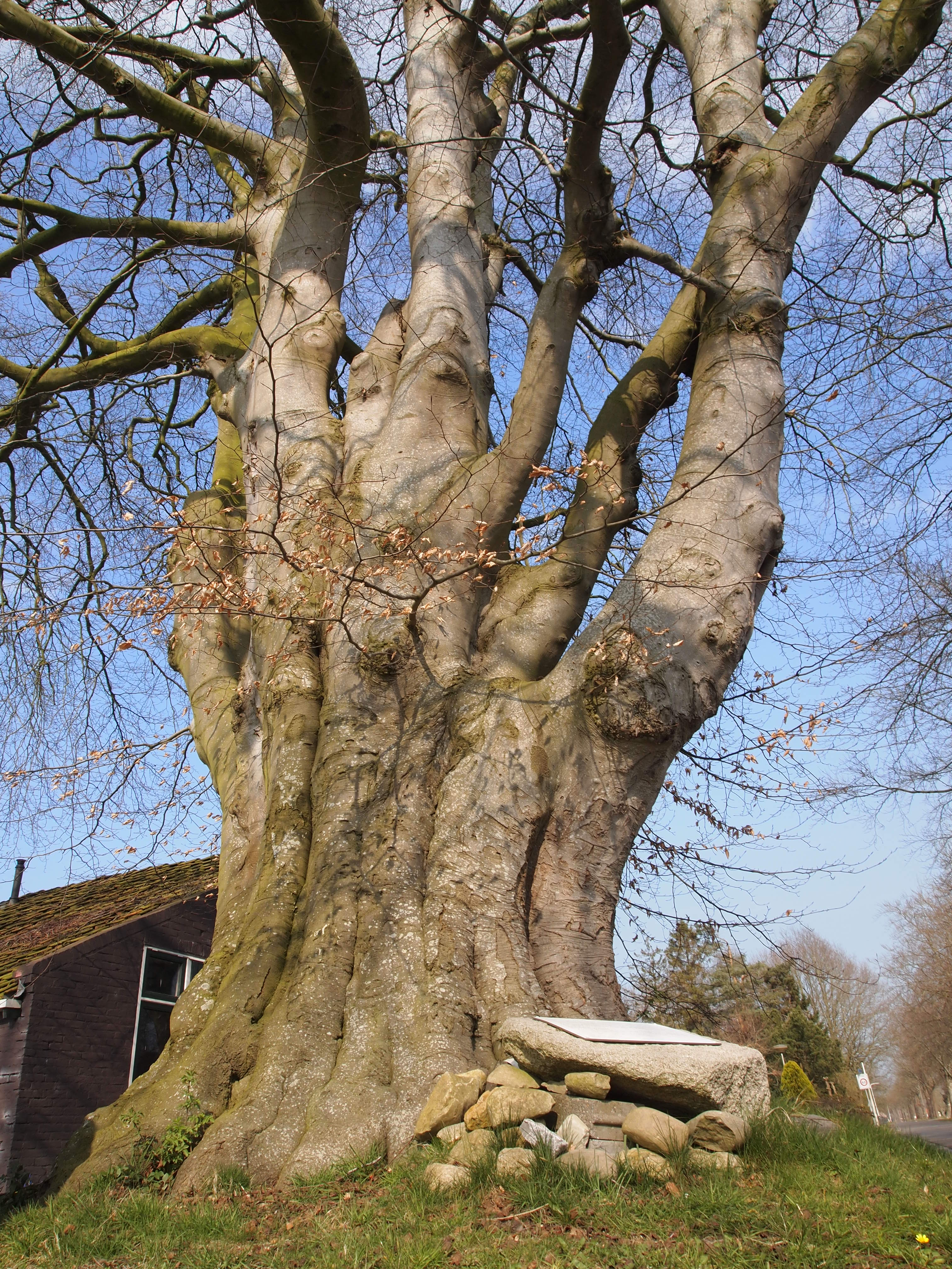 De Poppebeam fan Jobbegea Hoornsterzwaag